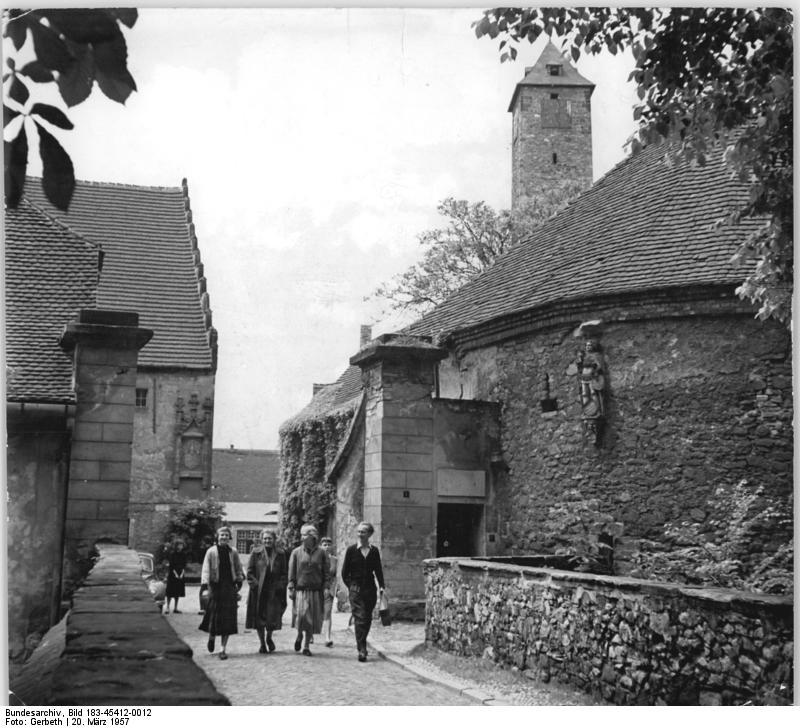 Halle, Institut für künstlerische Werkgestaltung Zentralbild Gerbeth 20.3.1957 Deutsches Kunsthandwerk wird weiterentwickelt. Institut für künstlerische Werkgestaltung Etwa 130 Studenten, davon die Hälfte Arbeiter- und Bauernkinder, werden gegenwärtig im Institut für künsterlische Werkgestaltung in Halle ausgebildet. Das Institut ist in der DDR das einzige seiner Art. Während einer fünfjährigen Ausbildungszeit erwerben sich die Studierenden in den Werkstätten der Abteilungen Metall, Email, Textil, angewandte Malerei, angewandte Plastik, angewandte Grafik, Bau- und Raumgestaltung bei entsprechender theoretischer Ergänzung die Fähigkeiten, später in Entwurfs- und Entwicklungsstellen der Industrie als Künstler tätig zu sein. UBz: Nach dem Studientag verlassen die Studenten ihr Institut durch das Burgtor. Information added by Wikimedia users.